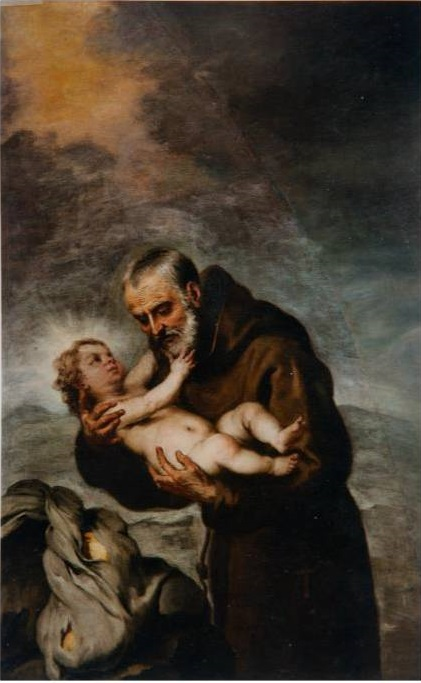 En este lienzo aparecen, y a tamaño natural, San Félix de Cantalicio y el Niño Jesús. Sán Félix aparece como un hombre anciano, vistiendo hábito monacal, y sosteniendo en sus manos al Niño Jesús, mientras que este acaricia con sus dedos la barba blanca del santo.